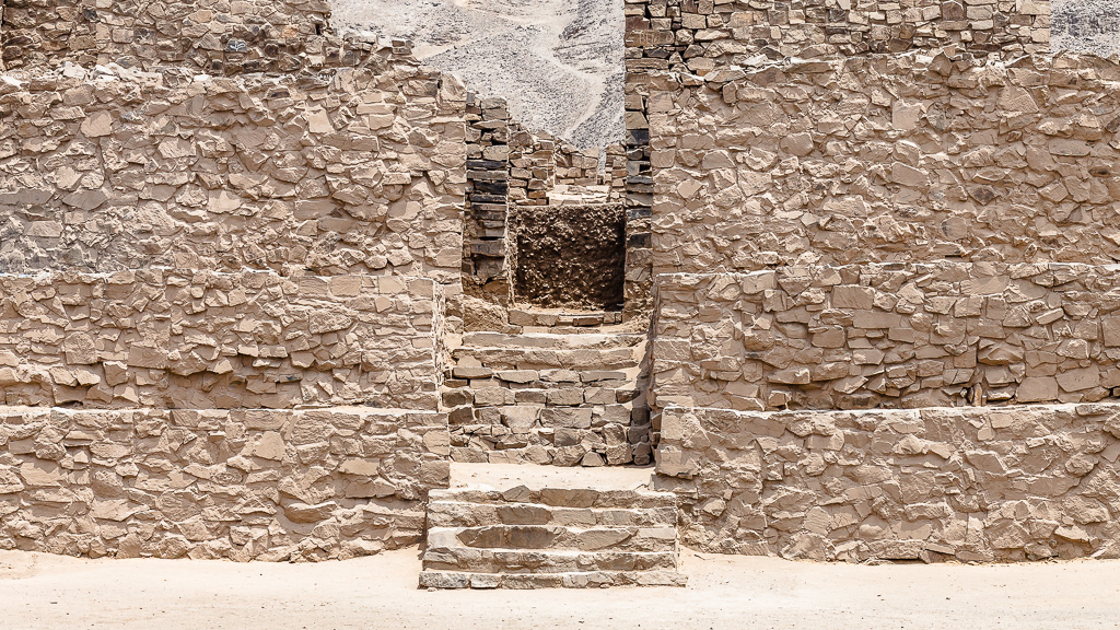 Escalinata frontal de acceso